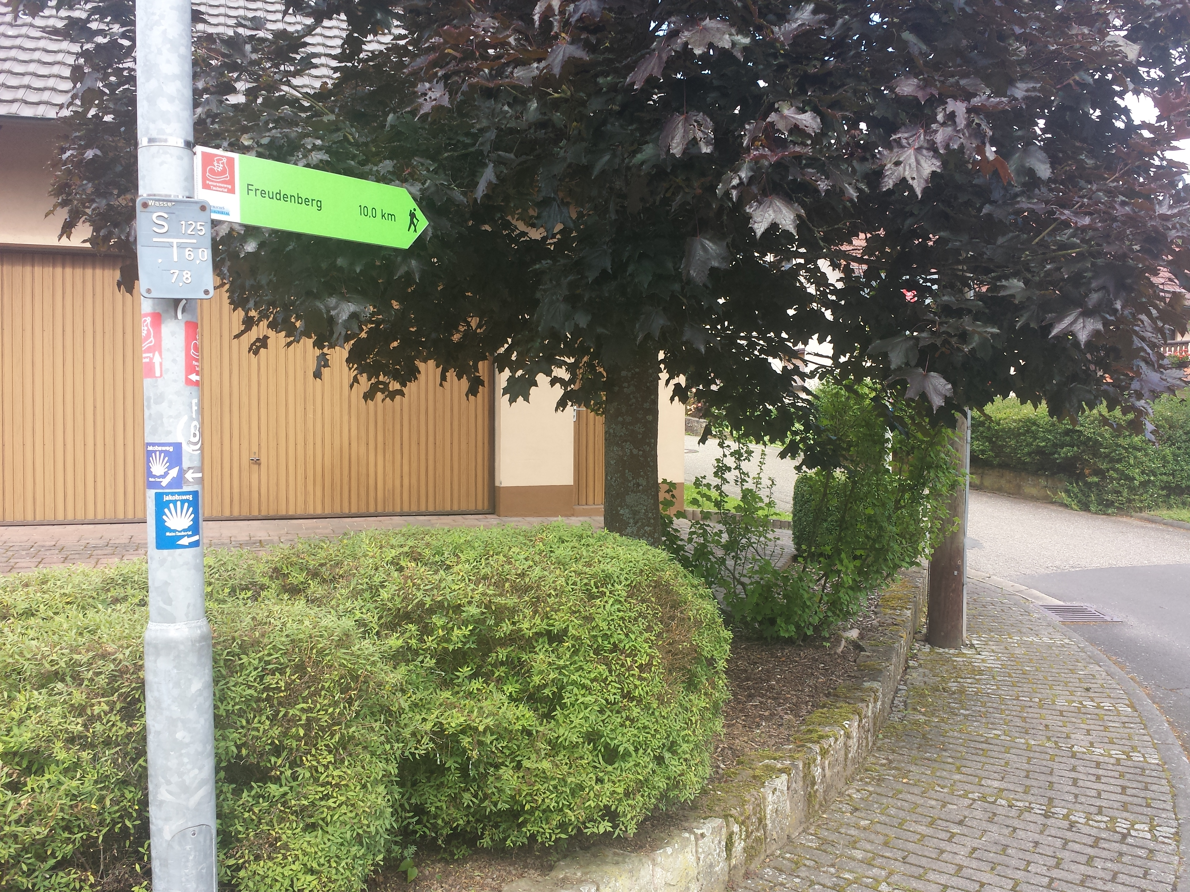 Bild: Der Jakobsweg Main-Taubertal an einer Kreuzung in Boxtal. Die erste von neun Etappen des Jakobswegs Main-Taubertal beginnt in Miltenberg im gleichnamigen Landkreis Miltenberg in Bayern und führt über Freudenberg bis nach Boxtal im Main-Tauber-Kreis in Baden-Württemberg. Die zweite Etappe des Jakobswegs Main-Taubertal führt von Boxtal bis Wertheim.